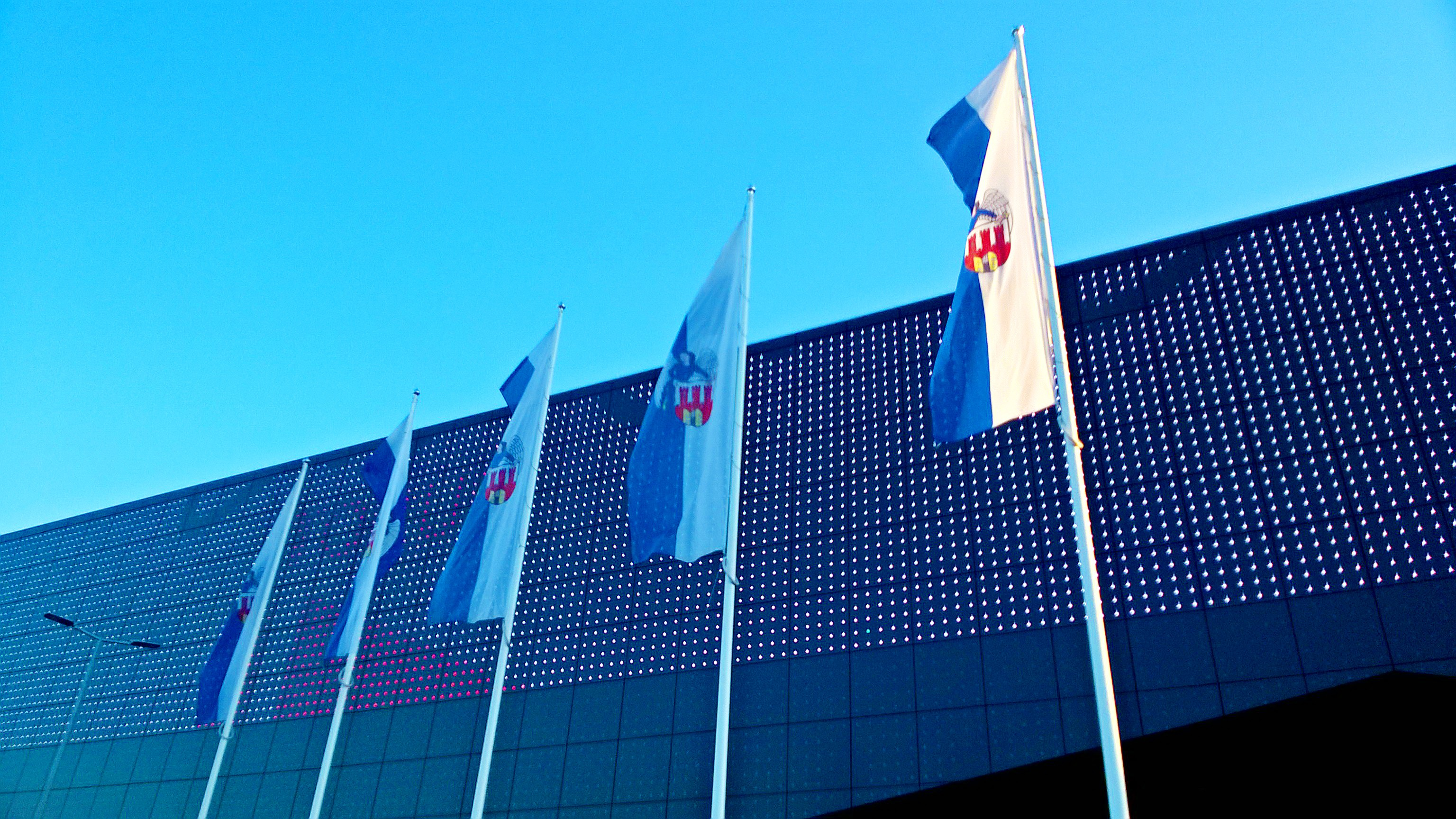 Hala w Toruniu